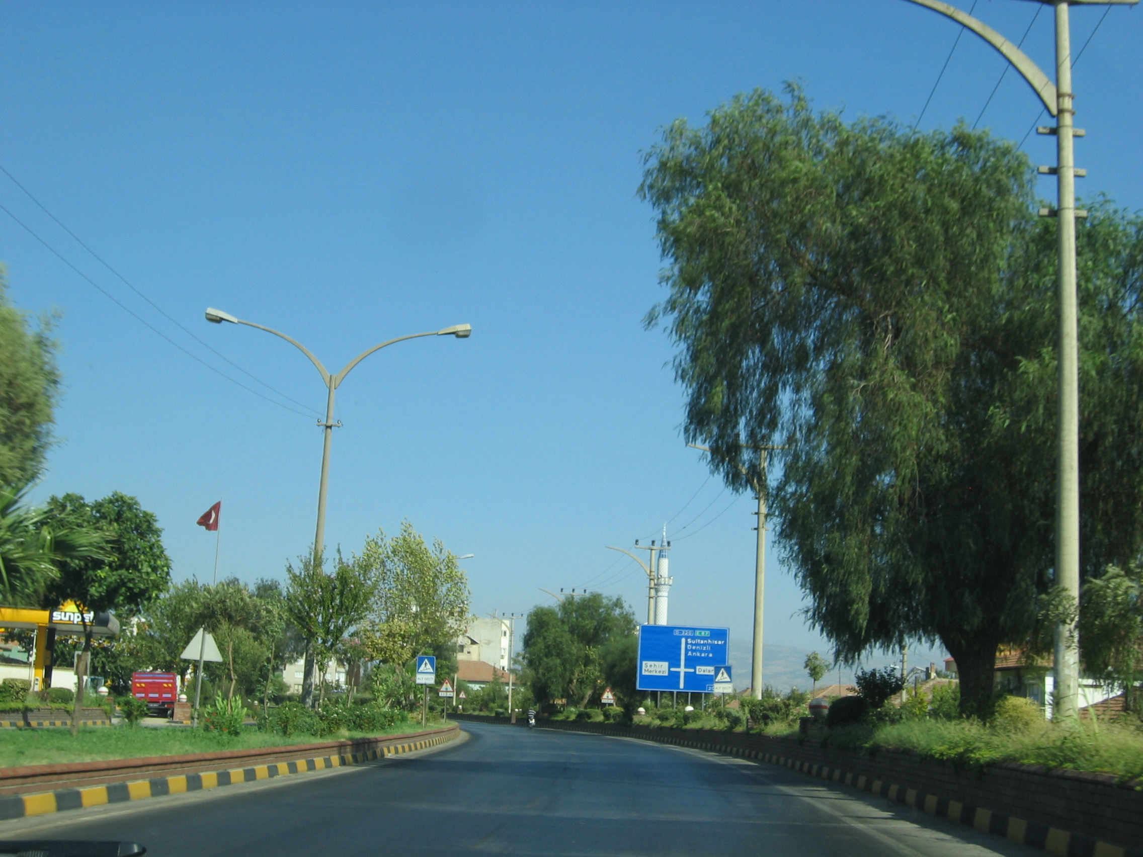 Aydin KÖSK